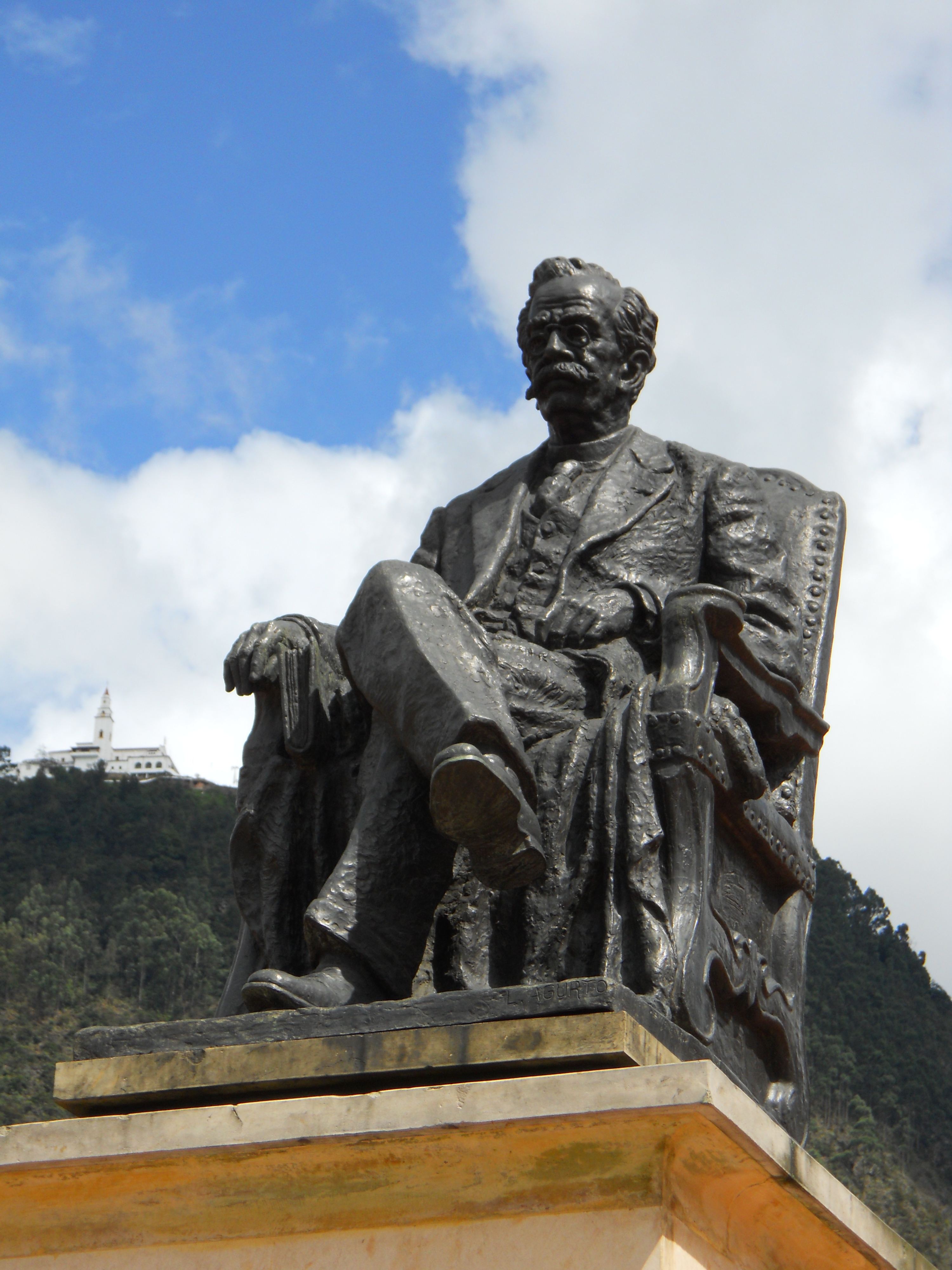 Estatua de Ricardo Palama en la plazuela de la iglesia de Las Aguasa. Eje Ambiental con calle diecinueve.